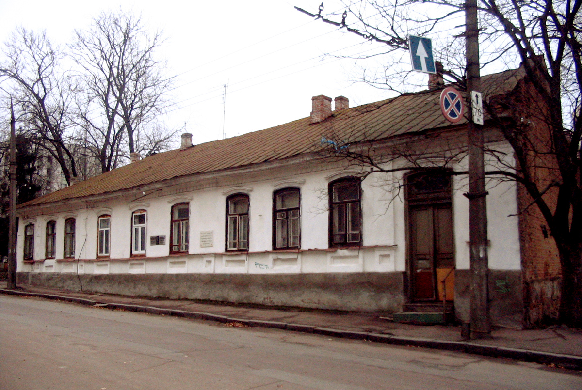 Беларуская (тарашкевіца): Хата ў Жытоміры на вул. Любарскай, у якой мешкаў Язэп Крашэўскі ў 1847—1858 рр.